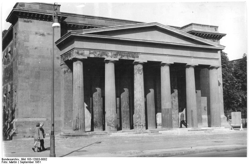 Illus-Martin-27.9.51 Berlin 1951. Das von Schinkel als Neue Wache erbaute ehemalige Ehrenmal Unter den Linden nach seiner Restauration.